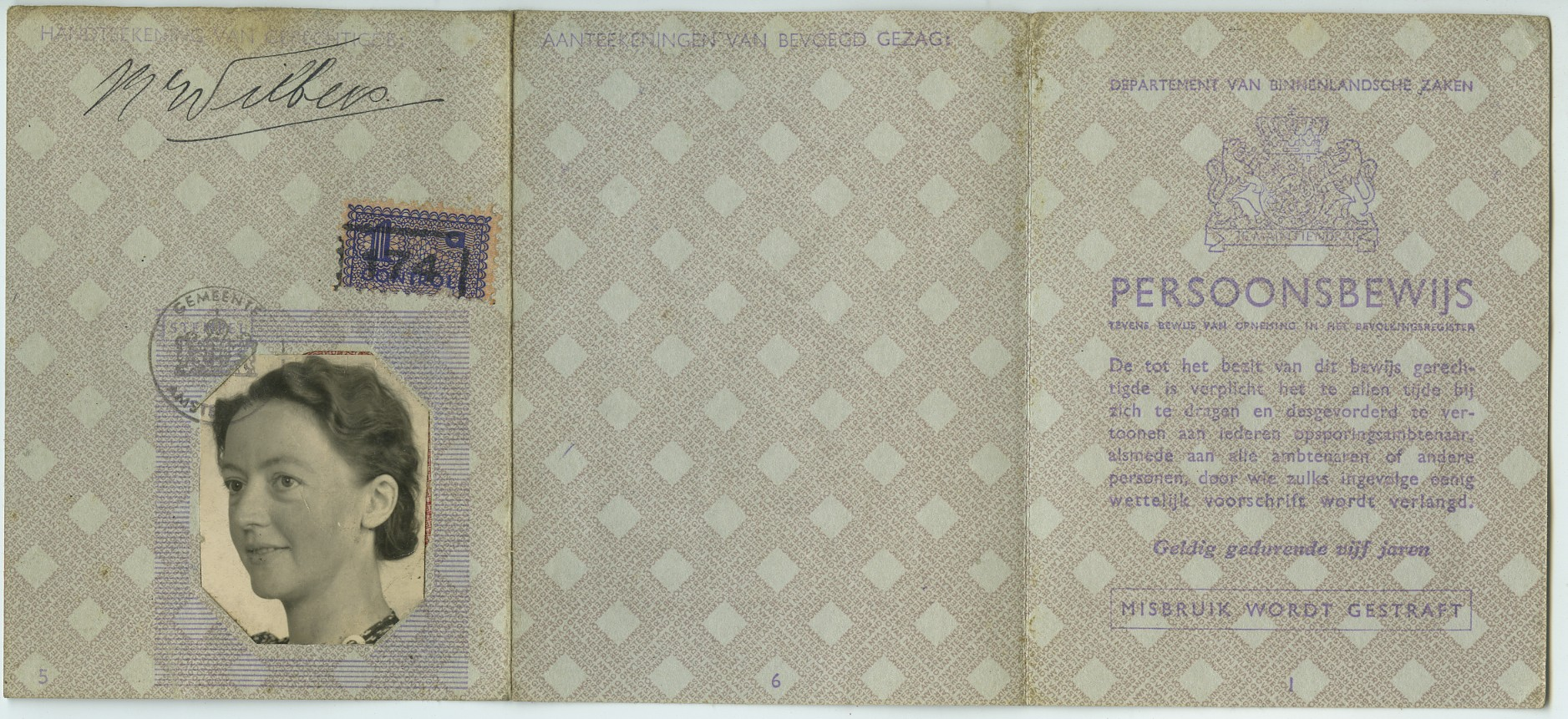 Voorzijde persoonsbewijs (Voor datering, zie: [1])